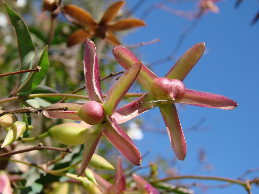 Merremia macrocalyx - CONVOLVULACEAE Parque Olhos D'Água - Brasília - Distrito Federal - Brasil.